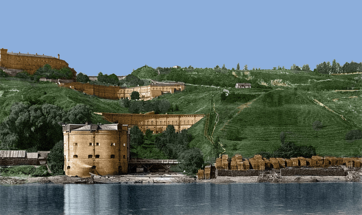 Подільська, Микільська брами і Верхні і Нижні напівкруглі підпірні мури Київської фортеці